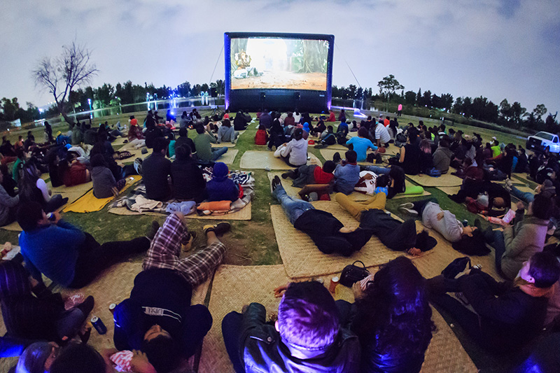 Gente viendo una película en el Bosque de San Juan de Aragón, programa Lagocinema